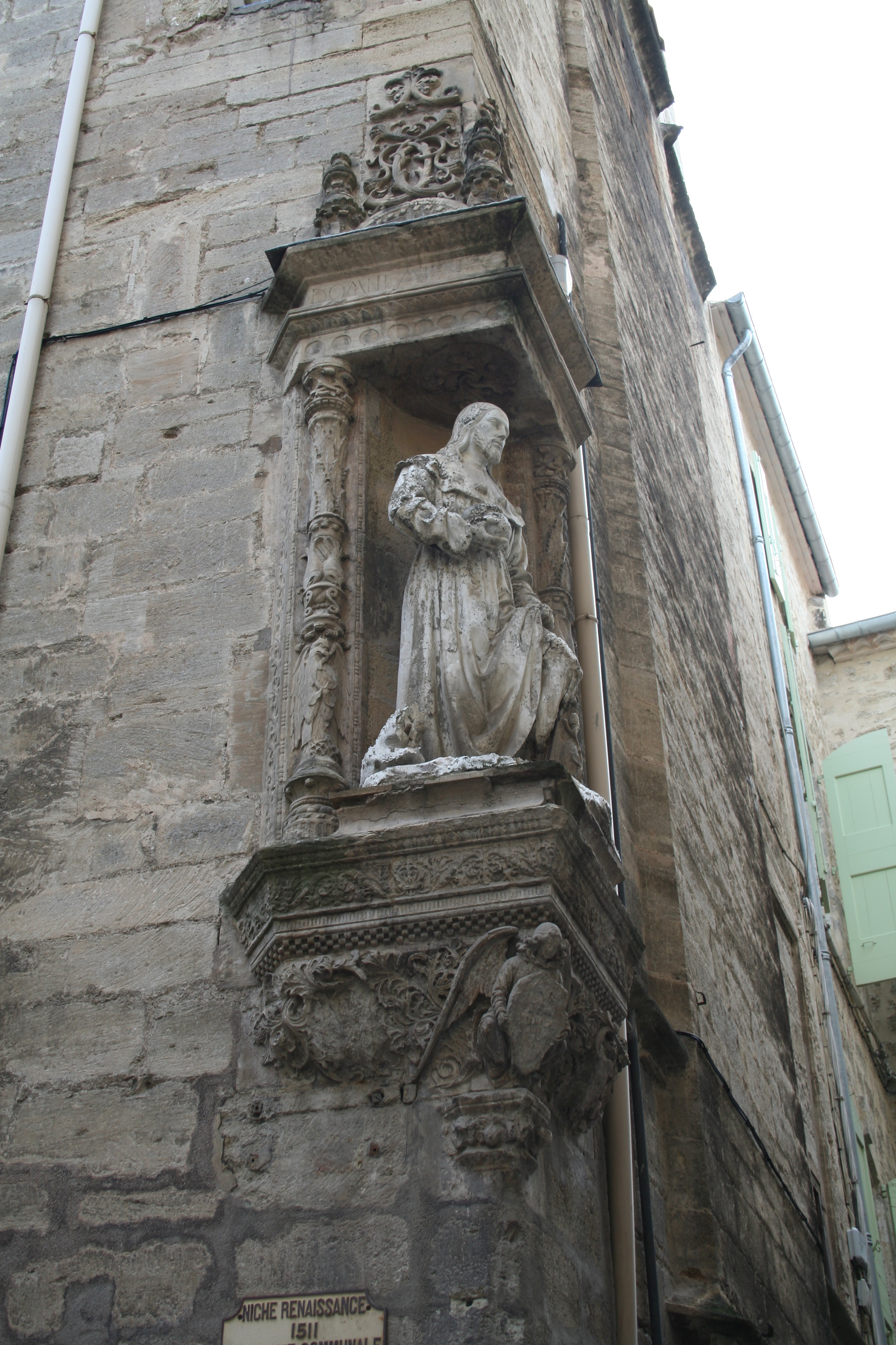 Pézenas (Hérault) - Statue de Saint-Roch.